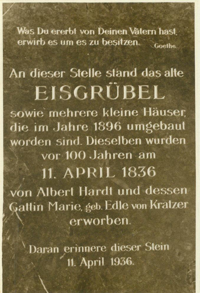 100 Jahre Gedenktafel anlässlich des Erwerbes und Umbaues des alten Eisgrübels